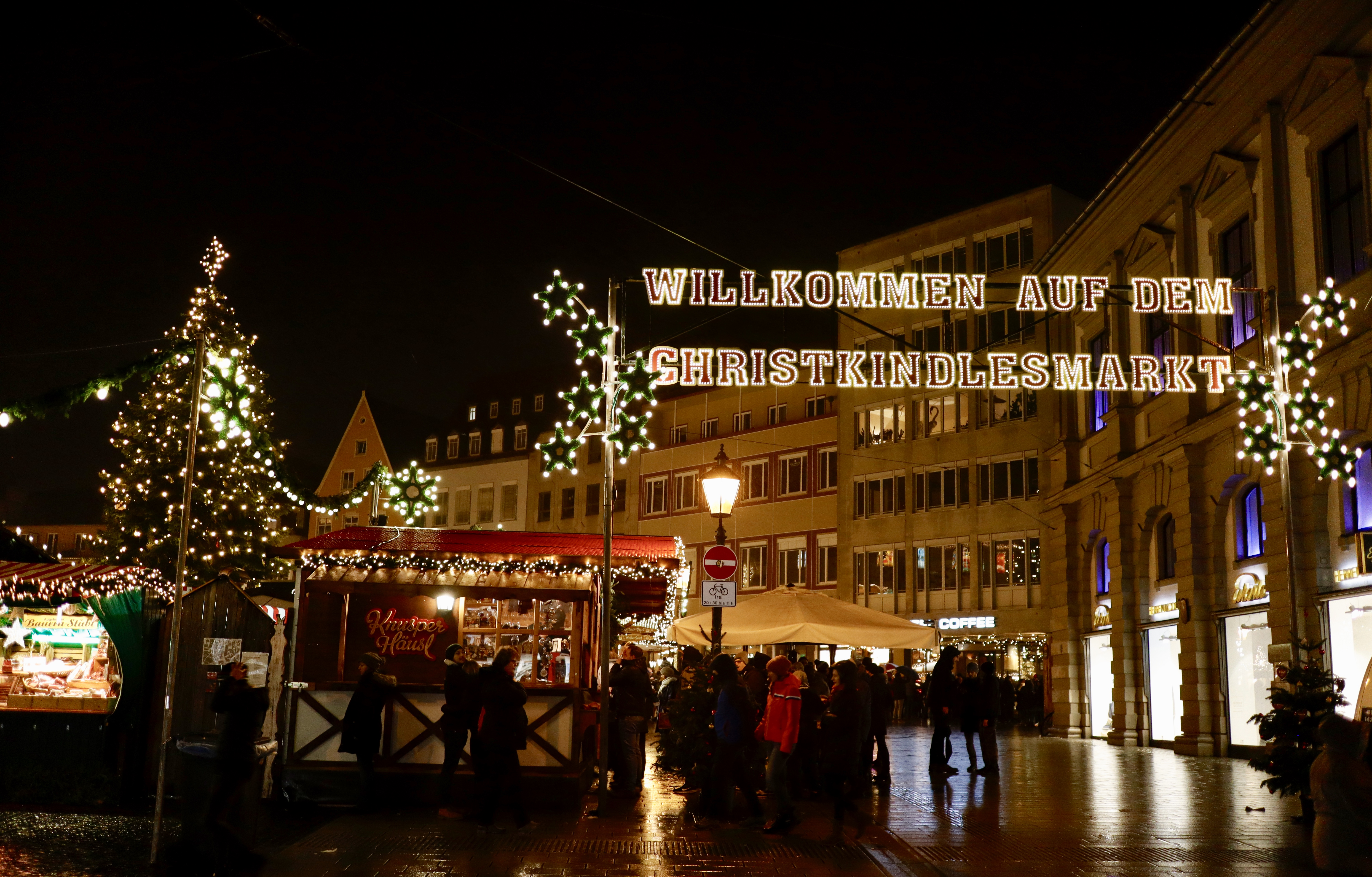 Der Eingang zum Augsburger Christkindlesmarkt im Jahr 2018.